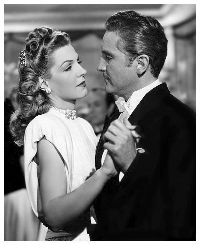 Zully Moreno y Arturo de Córdova en la película Dios se lo pague.